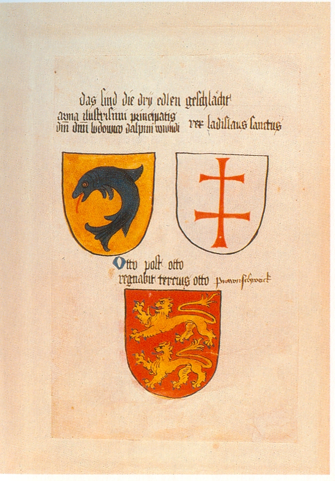 Ingeram-Codex der ehemaligen Bibliothek Cotta Xvij das sind die dry edlen geschleicht arma ilustrisimi principatis/dm (domini) dmi ludowico dalpini wiv(e)ndi (Ludwig XI. v. Frankreich als Dauphin, vor 1461) rex ladislaus sanctus (Ladislaus der Heilige, König von Ungarn 1077-1095) Otto post otto/regnabit tercius otto [Prawnschweick] (Herzog Otto III. von Braunschweig 1330-1352)